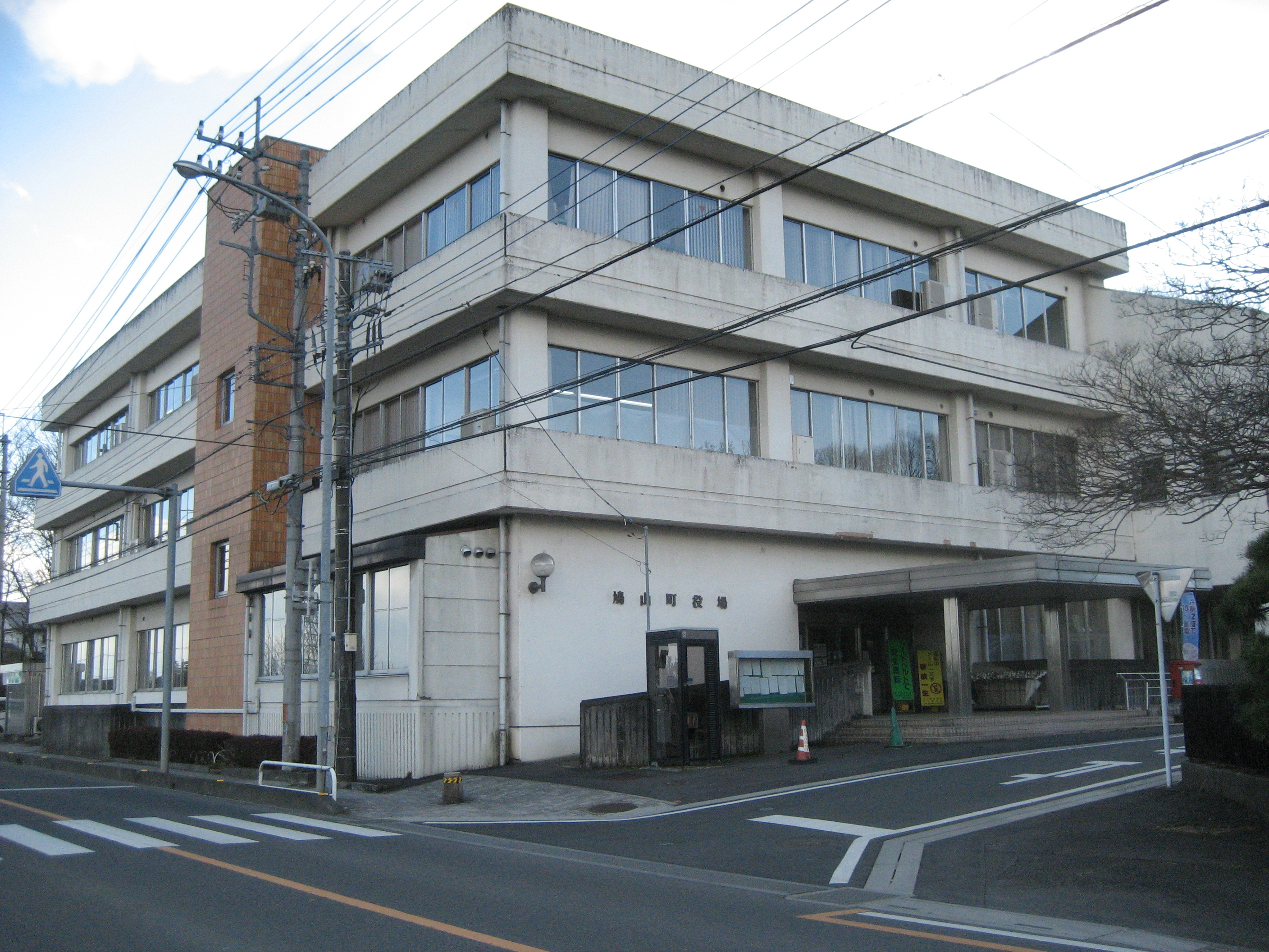 鳩山町役場庁舎